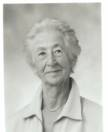 Mme le Professeur Simone Mayer